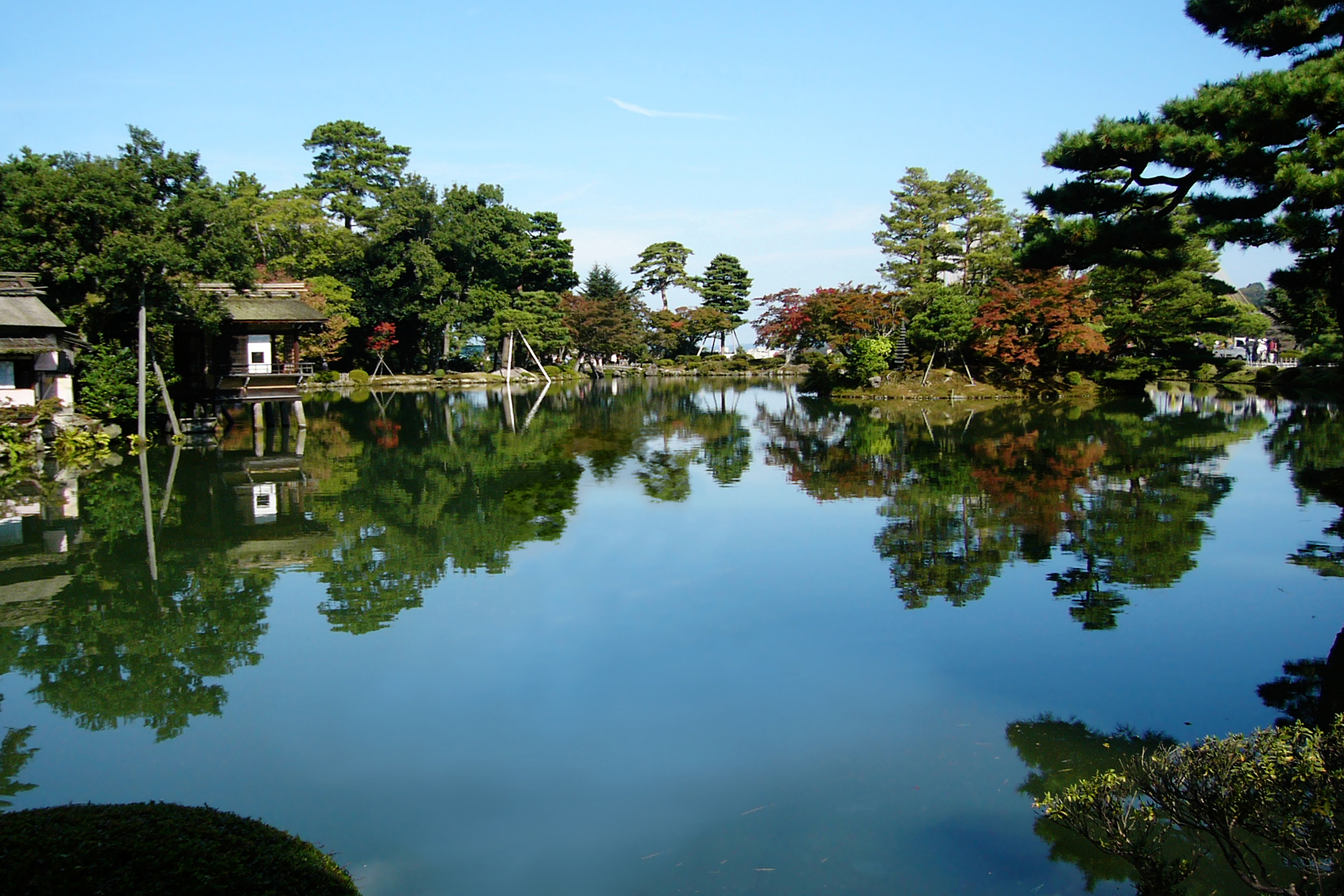 Kenrokuen (兼六園), Kanazawa, Ishikawa, Japan